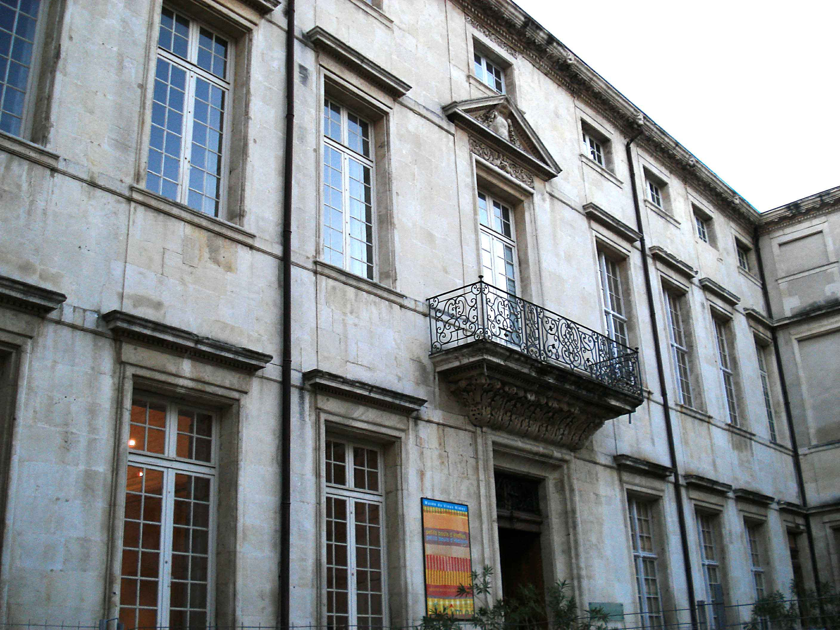 Ancien palais épiscopal de la ville de Nimes Auteur : R. BENEZET